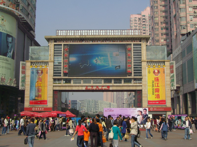 上下九广场